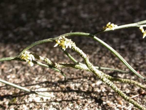 Campylocentrum parahybunense - Minas Gerais